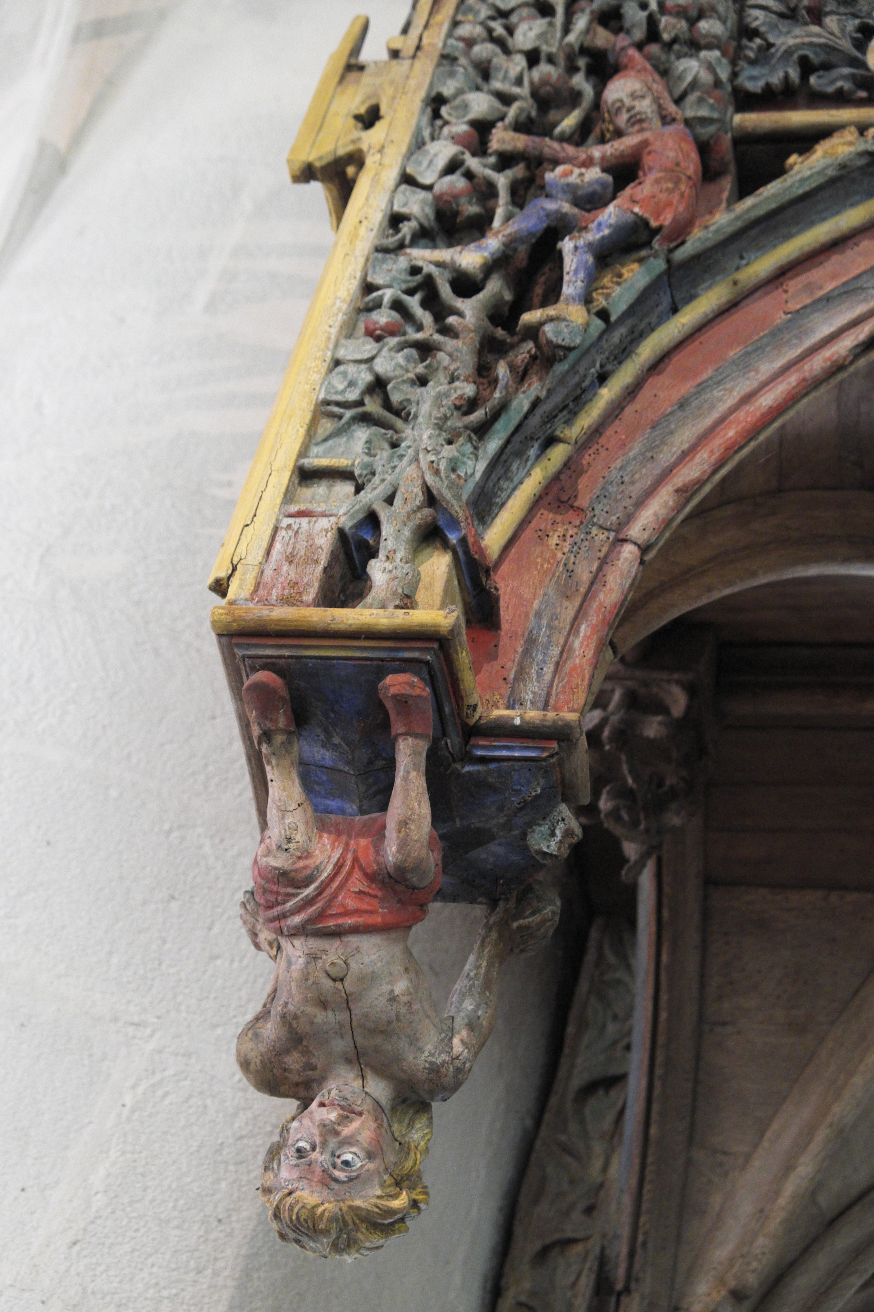 Kapelle Saint-Fiacre in Le Faouët im Département Morbihan (Region Bretagne/Frankreich), Lettner